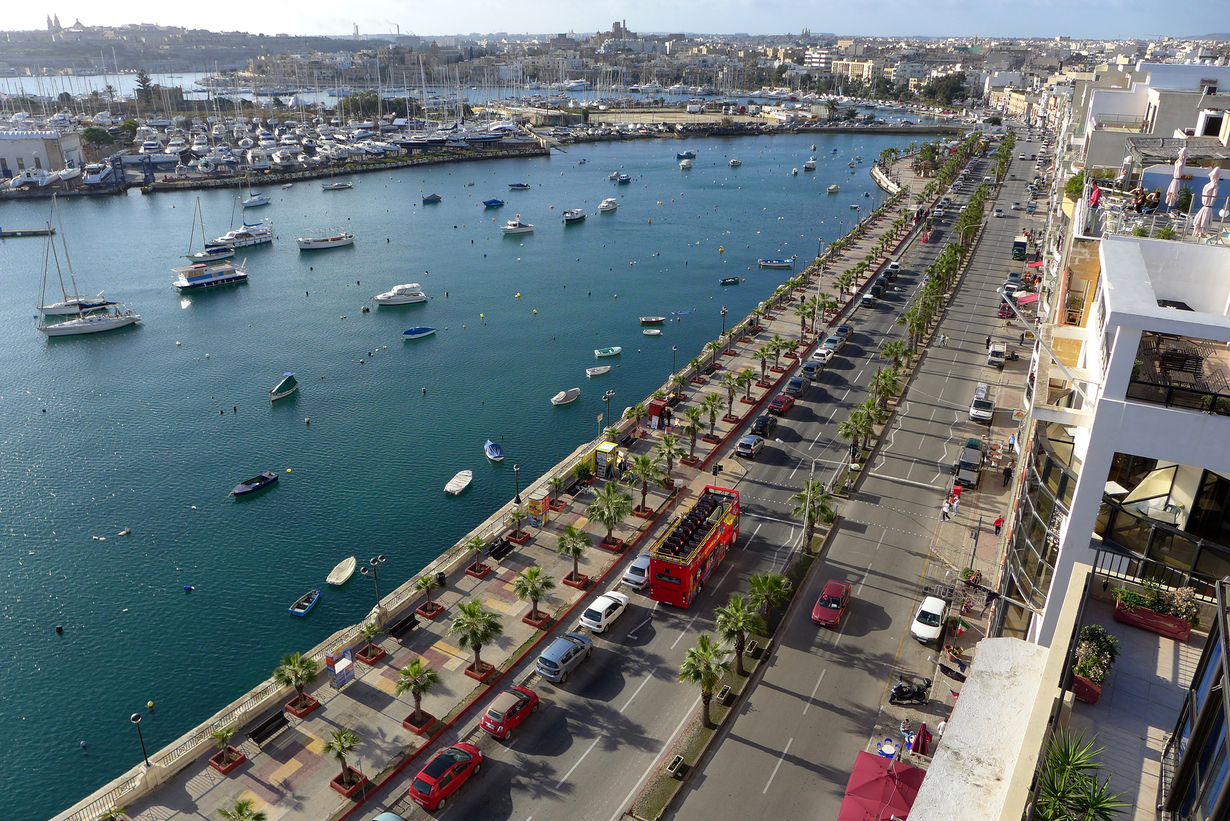 Triq Ix-Xatt in Gżira, Malta